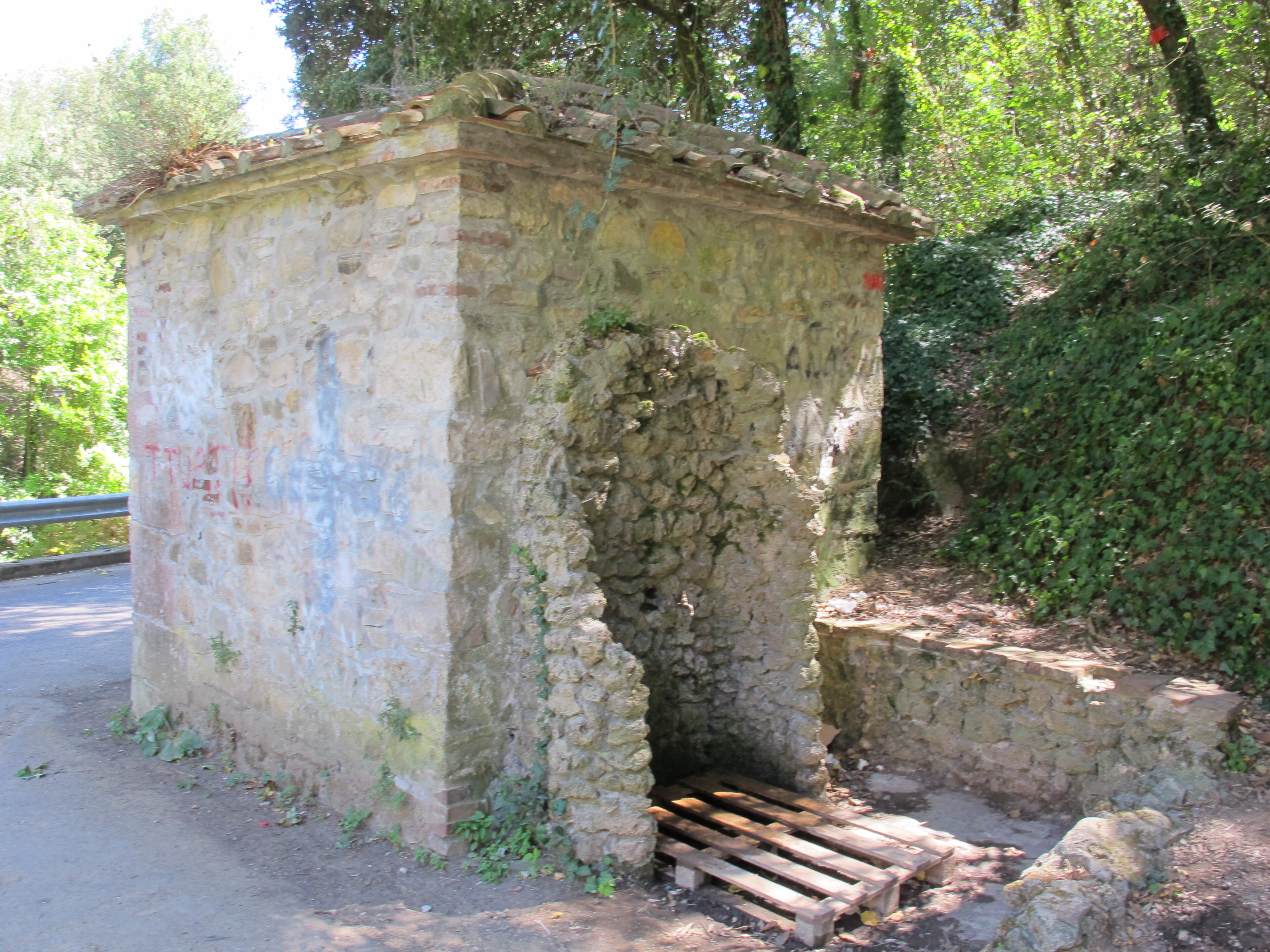 Suvereto, santissima annunziata 04 fonte